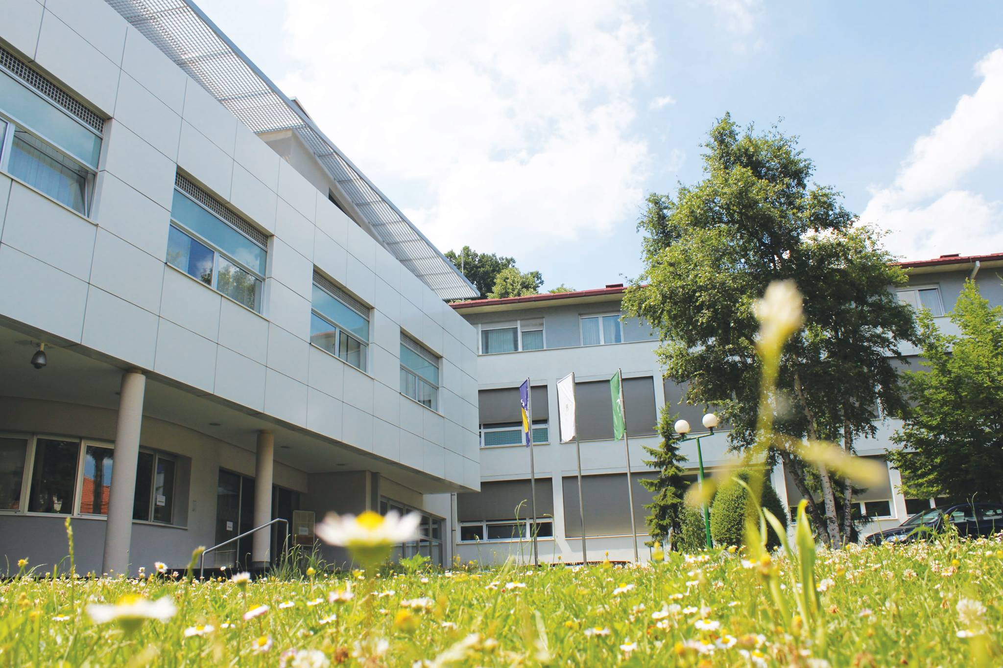 Zgrada medrese